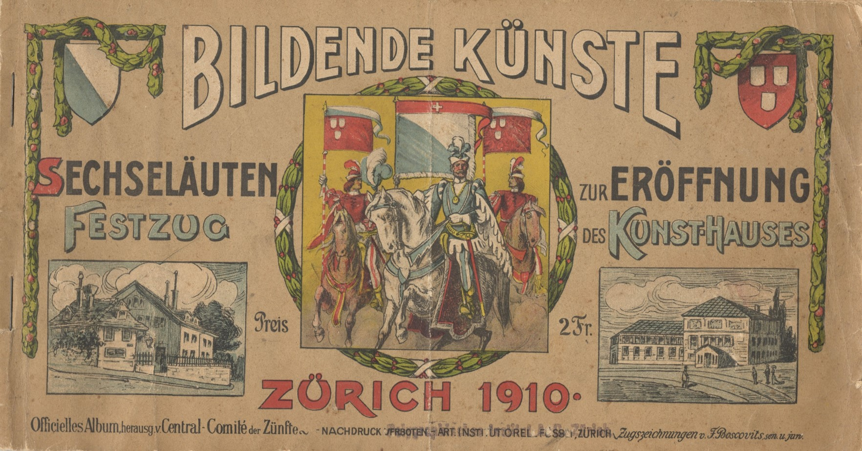 Druck